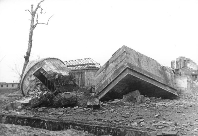 ADN-ZB/Donath Berlin: Der gesprengte sog. "Führerbunker" im Garten der im II. Weltkrieg zerstörten Reichskanzlei. Aufn. 1947